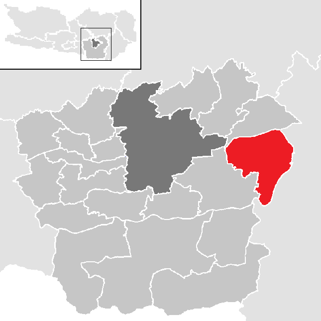 Bezirk Klagenfurt-Land